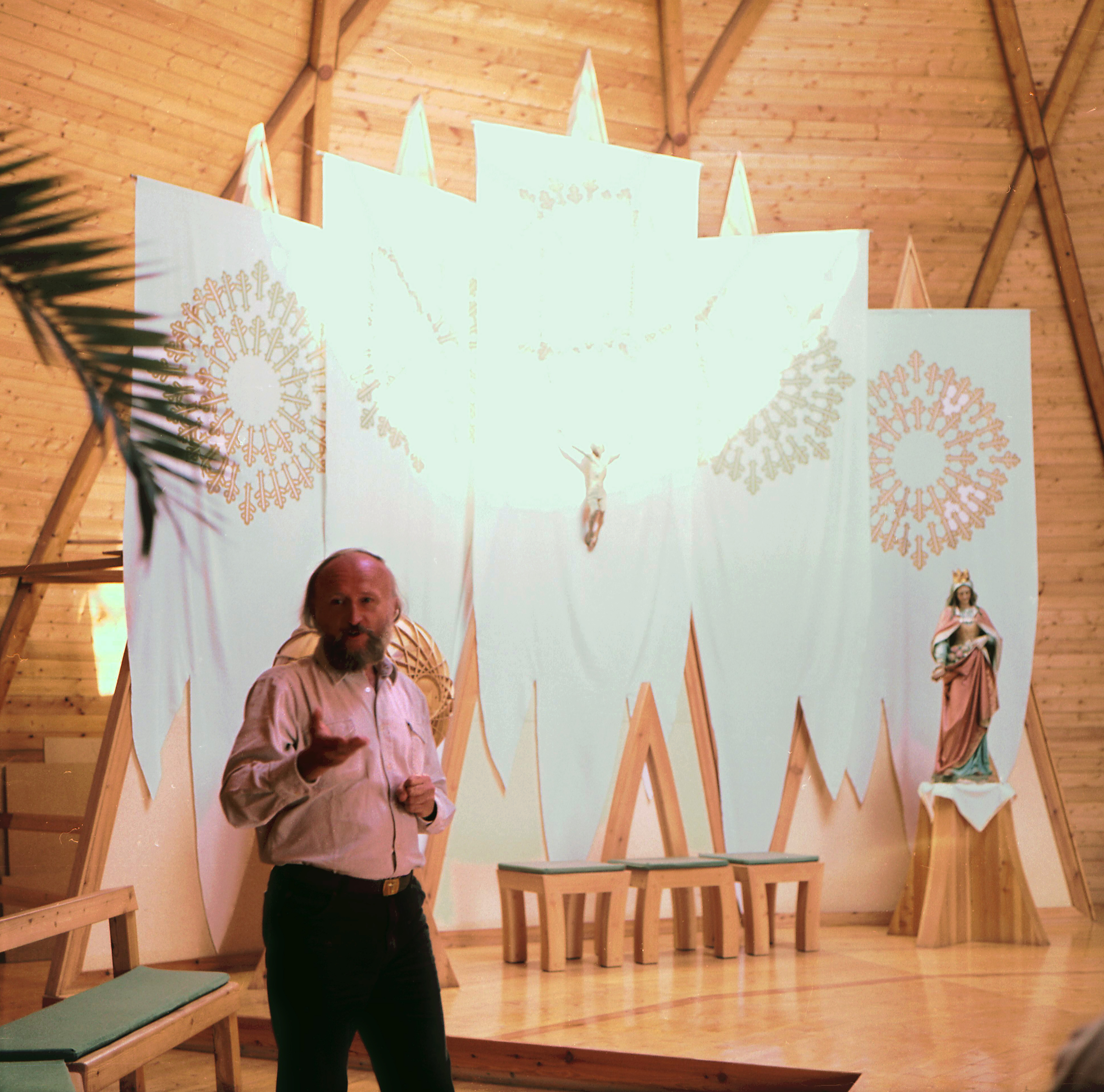 01.09.1986 Halásztelek auf der Insel Csepel (Ungarn). Der Architekt György Csete führt durch seine Kirche, erbaut 1981. Altar. [PLEA 86 - R19860831F13]19860901142NR(c)Blobelt